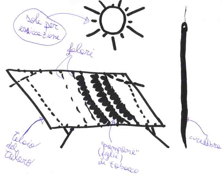 disegno di un "talaru" fatto a mano da un bambino salentino